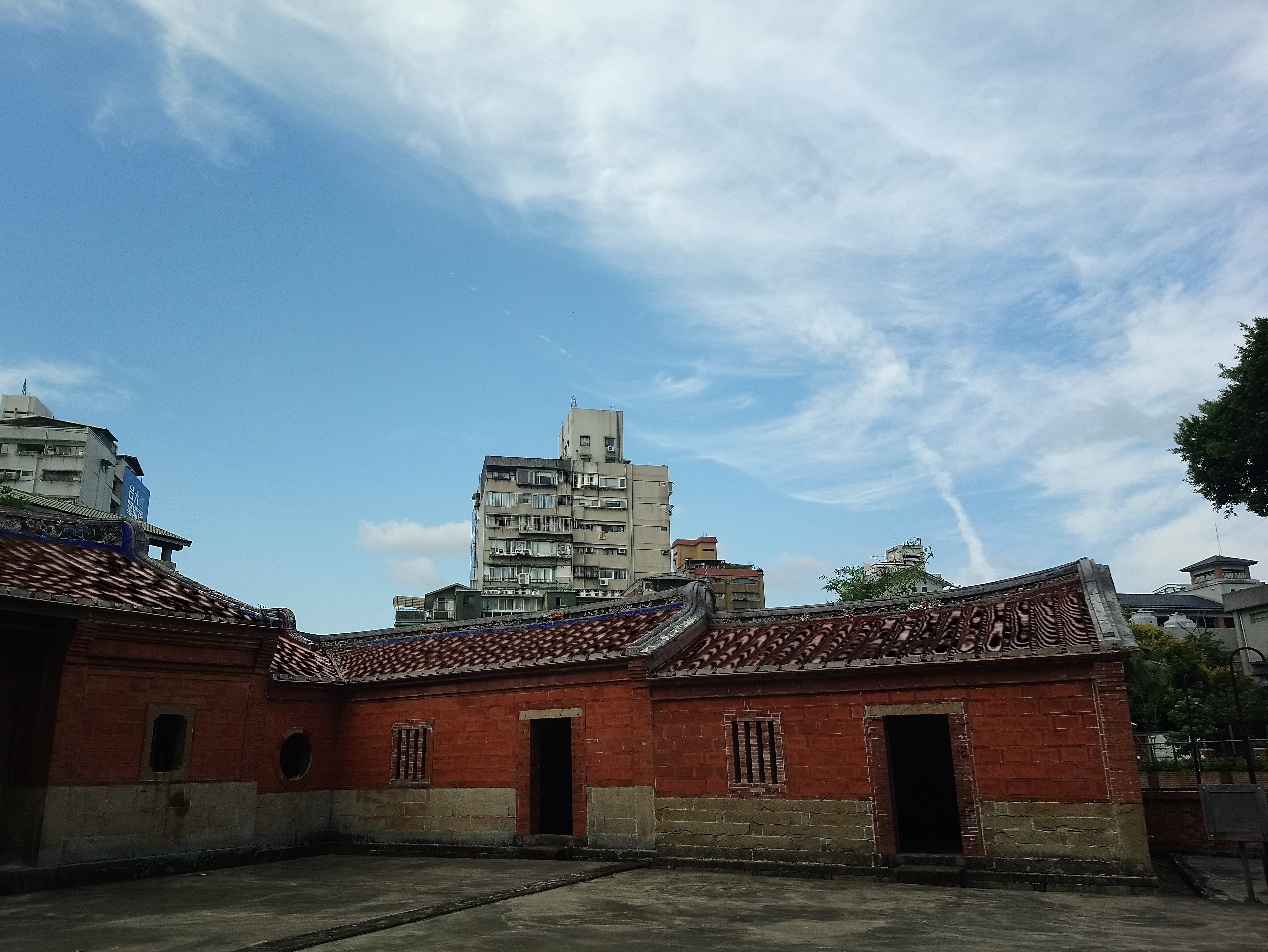 龍安坡黃宅濂讓居左側護龍,臺北市大安區學府次分區龍門里